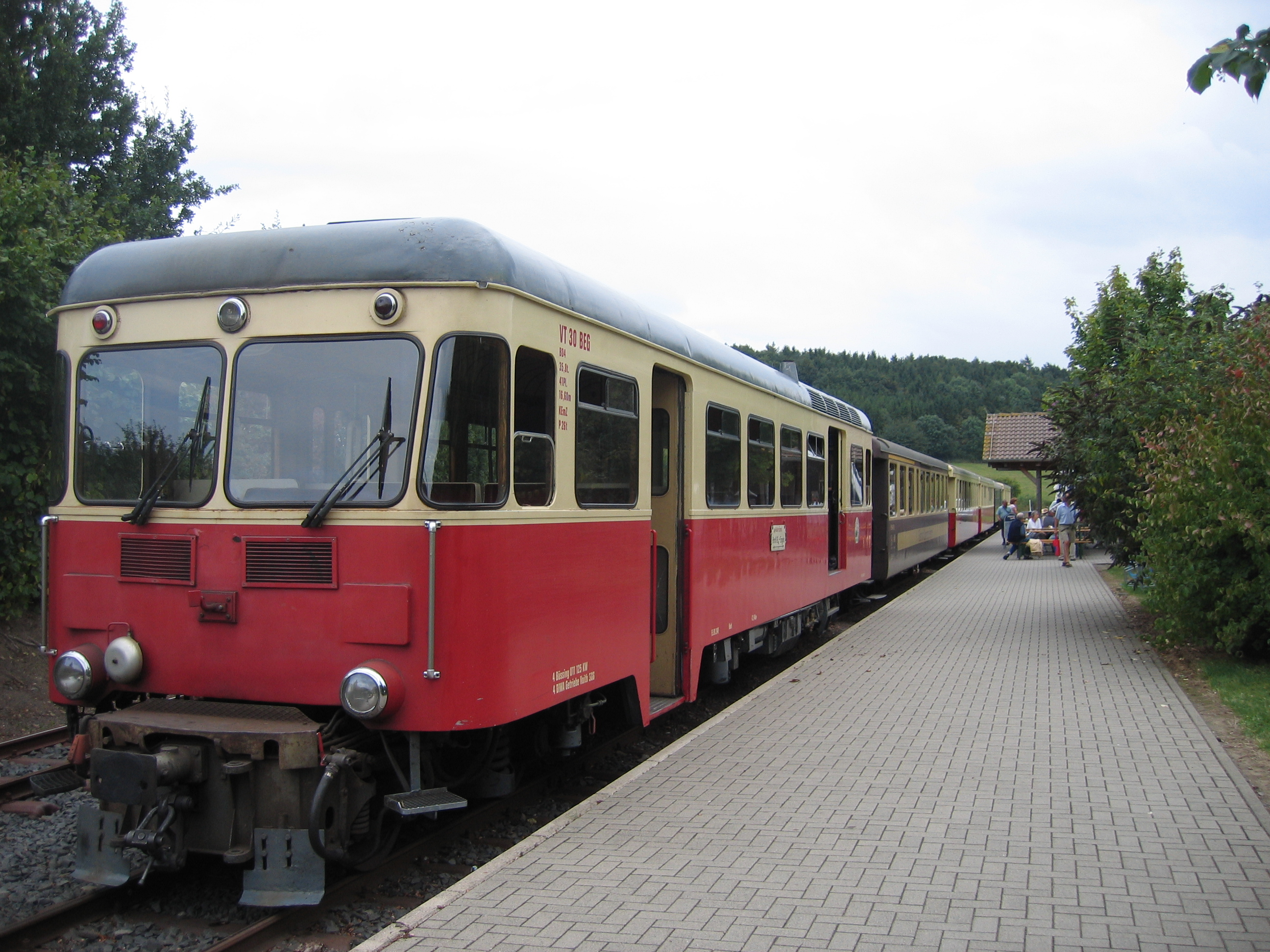 Waggons der Brohltalbahn